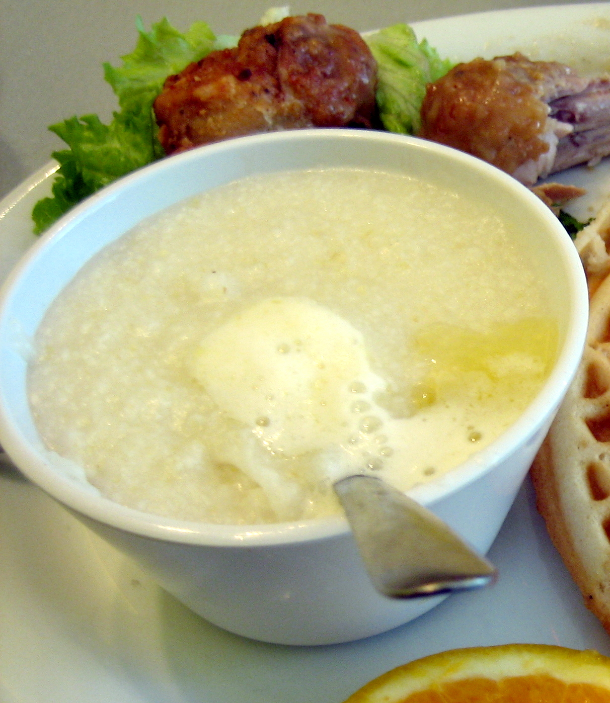 Grits.